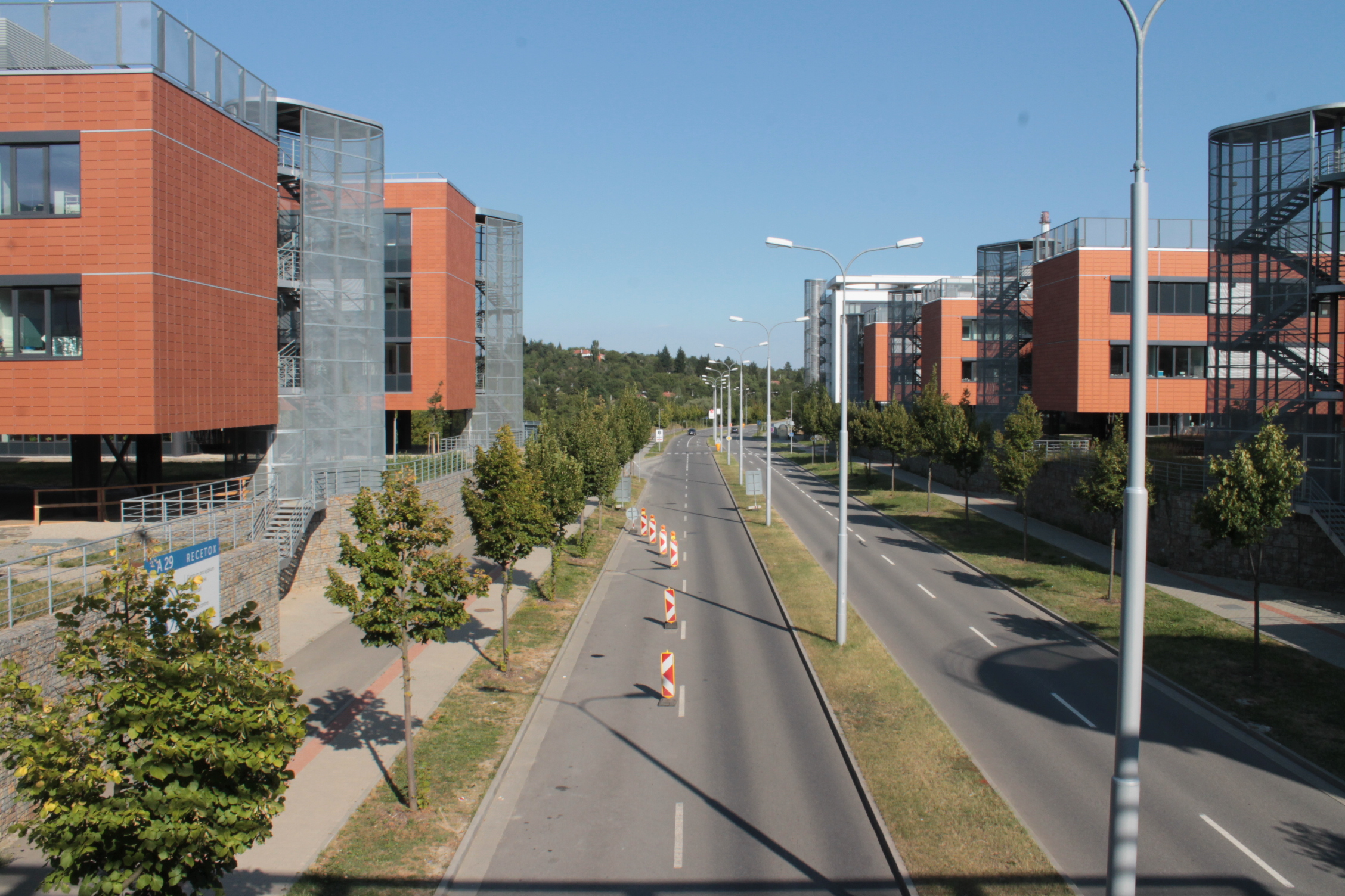 Masaryk University Campus